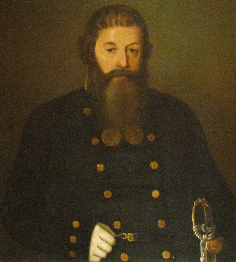 Рязанов Я.М. (1777 - 1849) Купец, городской голова Екатеринбурга в 1814 - 1817, 1820 - 1823, 1841 - 1844. Неизвестный художник, холст, масло, XIX век.